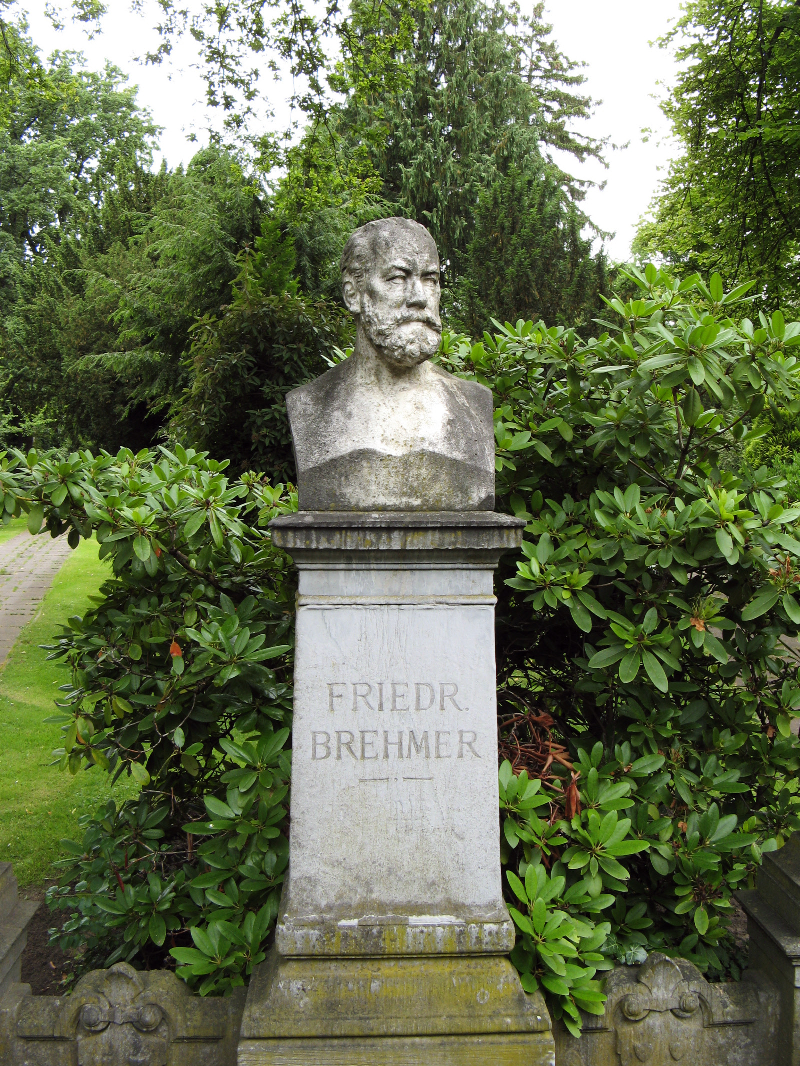 Porträtbüste von Heinrich Friedrich Brehmer auf dem Stadtfriedhof Engesohde in Hannover, Abteilung 40R, Grabstelle 24